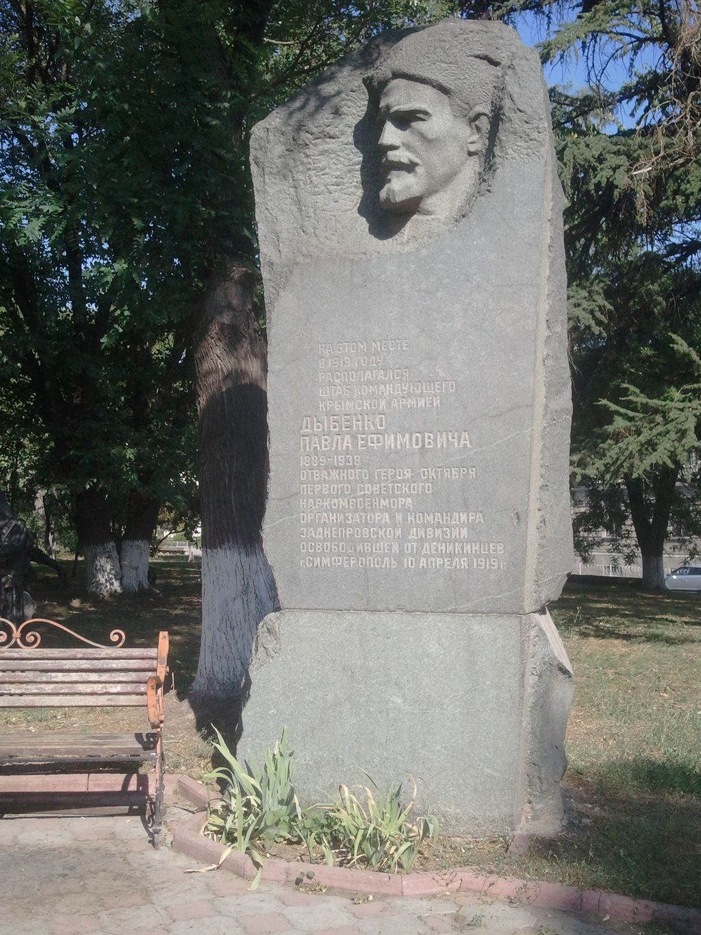 Мемориальная стела с горельефом П. Е. Дыбенко, первого наркомвоенмора Российской Советской Республики, установлена в Симферополе в 1968 году там, где в 1919 года находился штаб Крымской Красной Армии (угол проспекта Кирова и Совнаркомовского переулка, сквер им. Дыбенко). Скульптор — Н. П. Петрова.